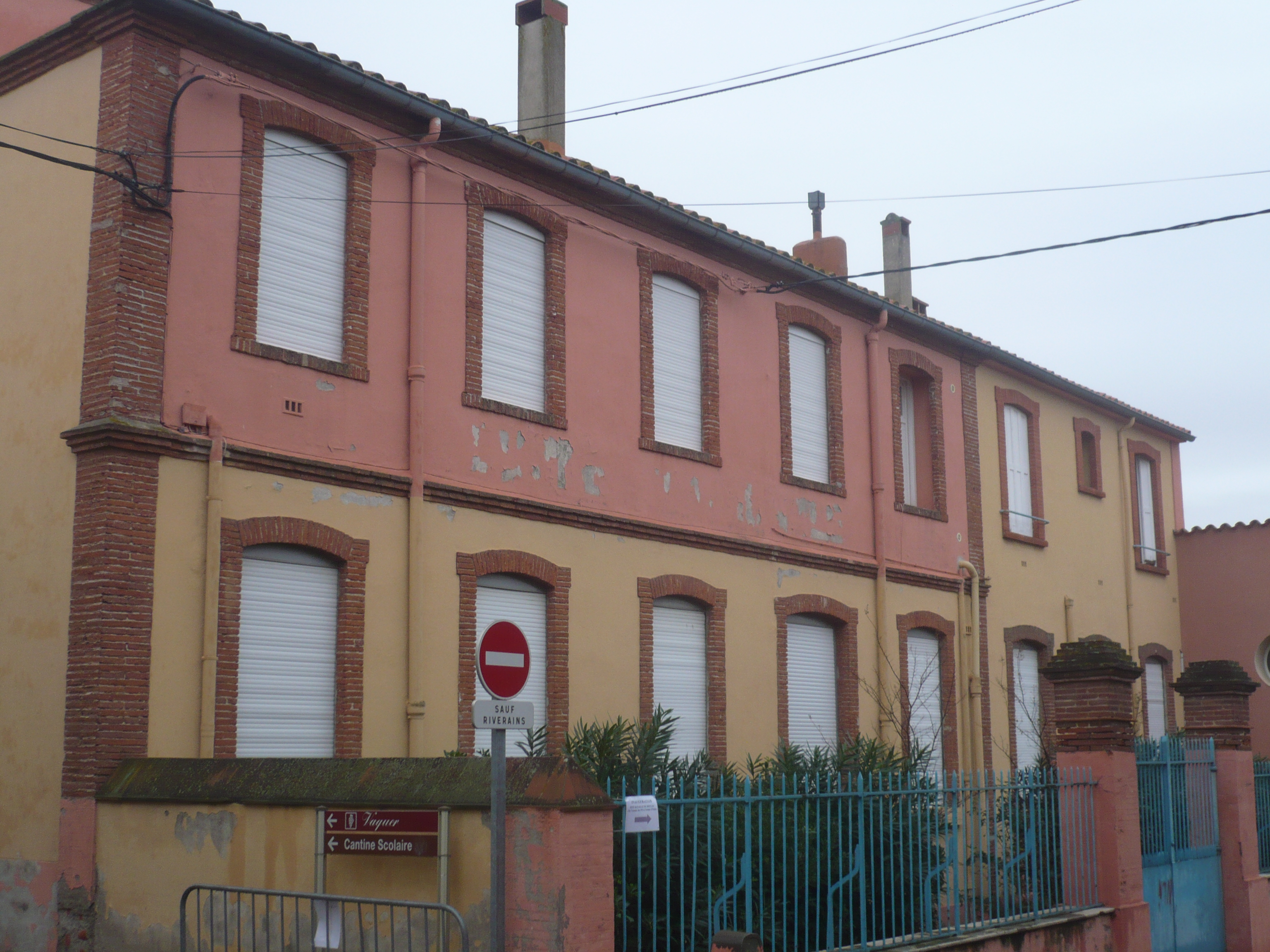 Ecole de Tresserre